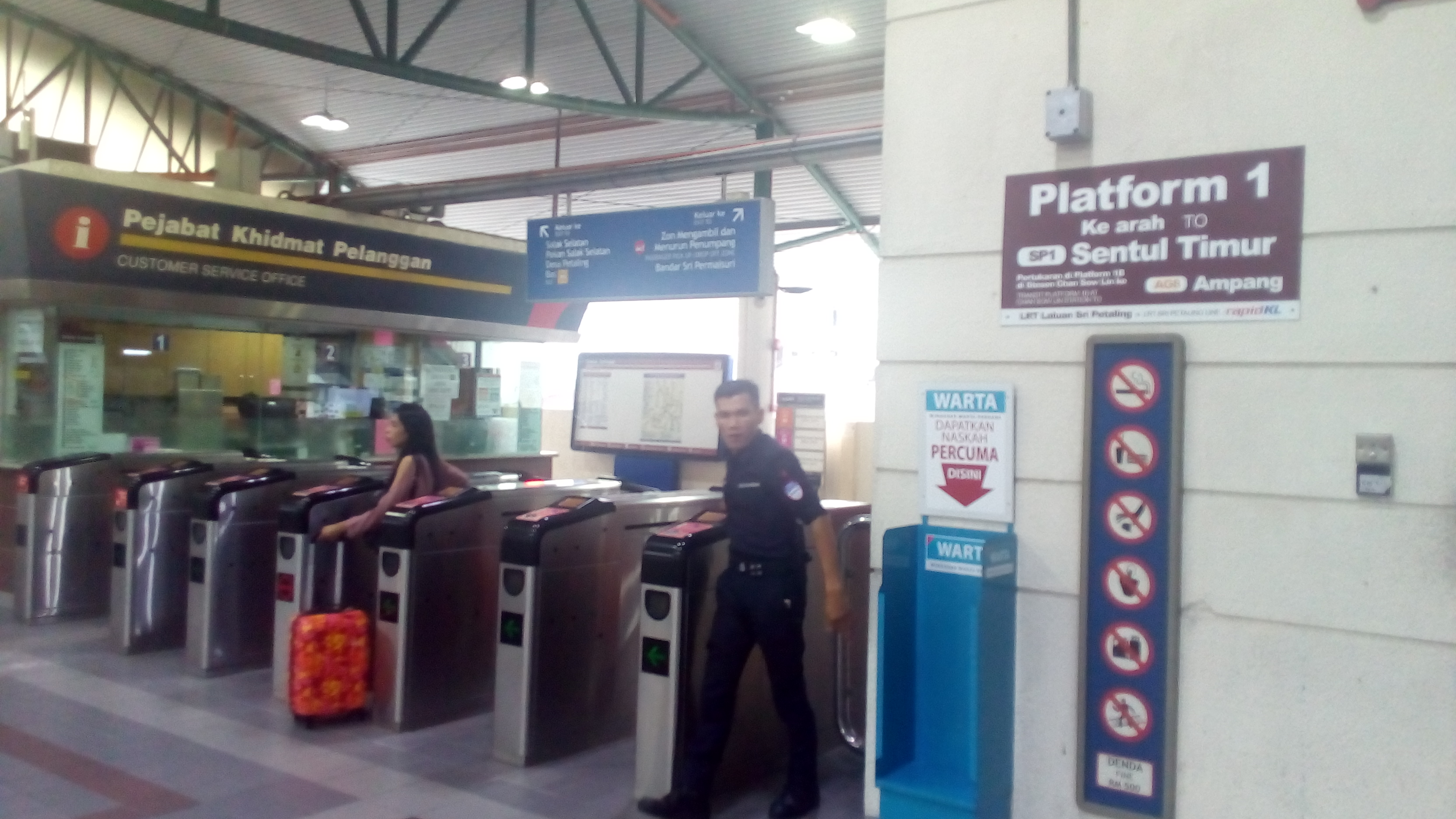 沙叻秀新村站验票闸门